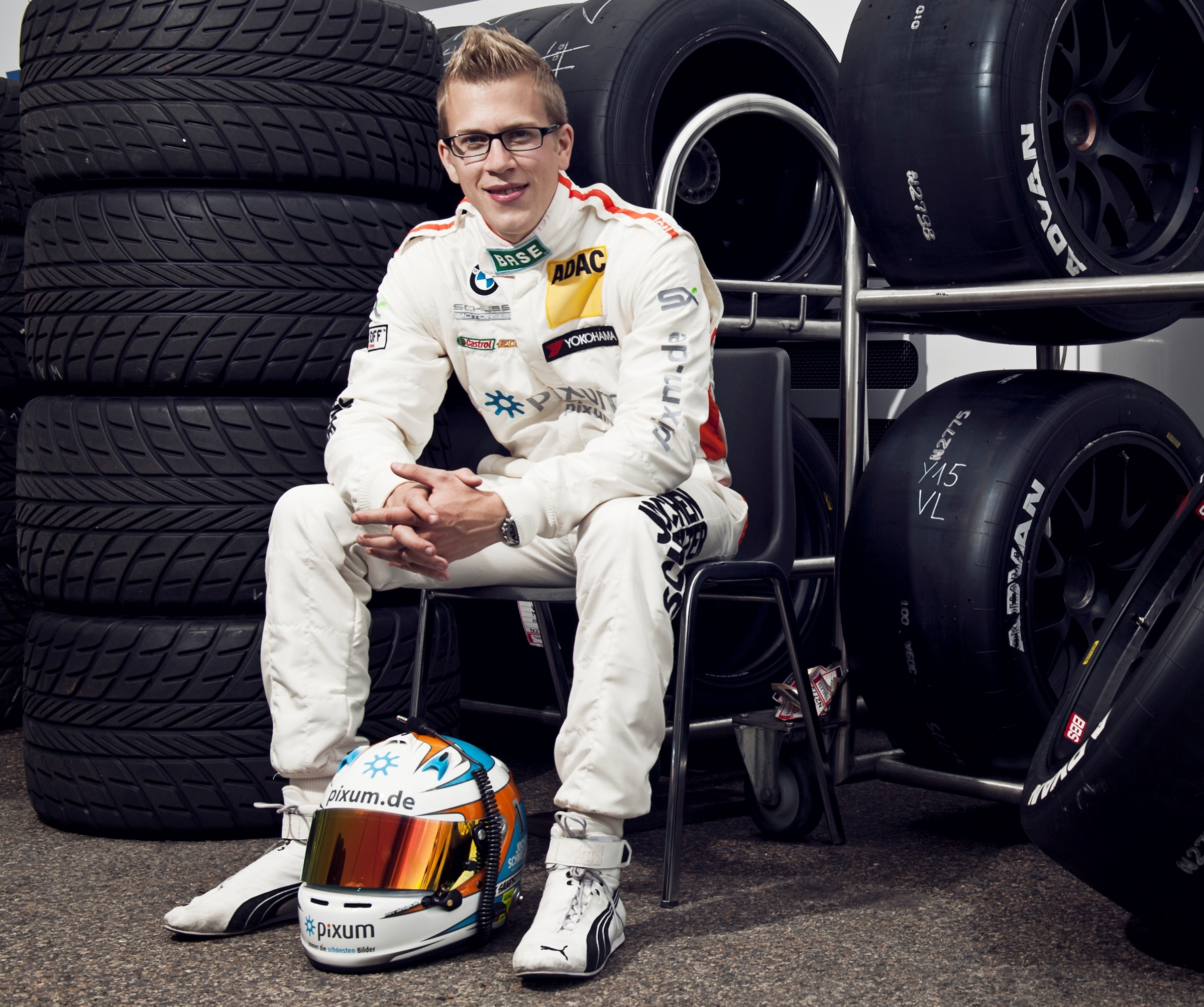 Maximilian Sandritter am Sachsenring (Photograph: Stev Bonhage).